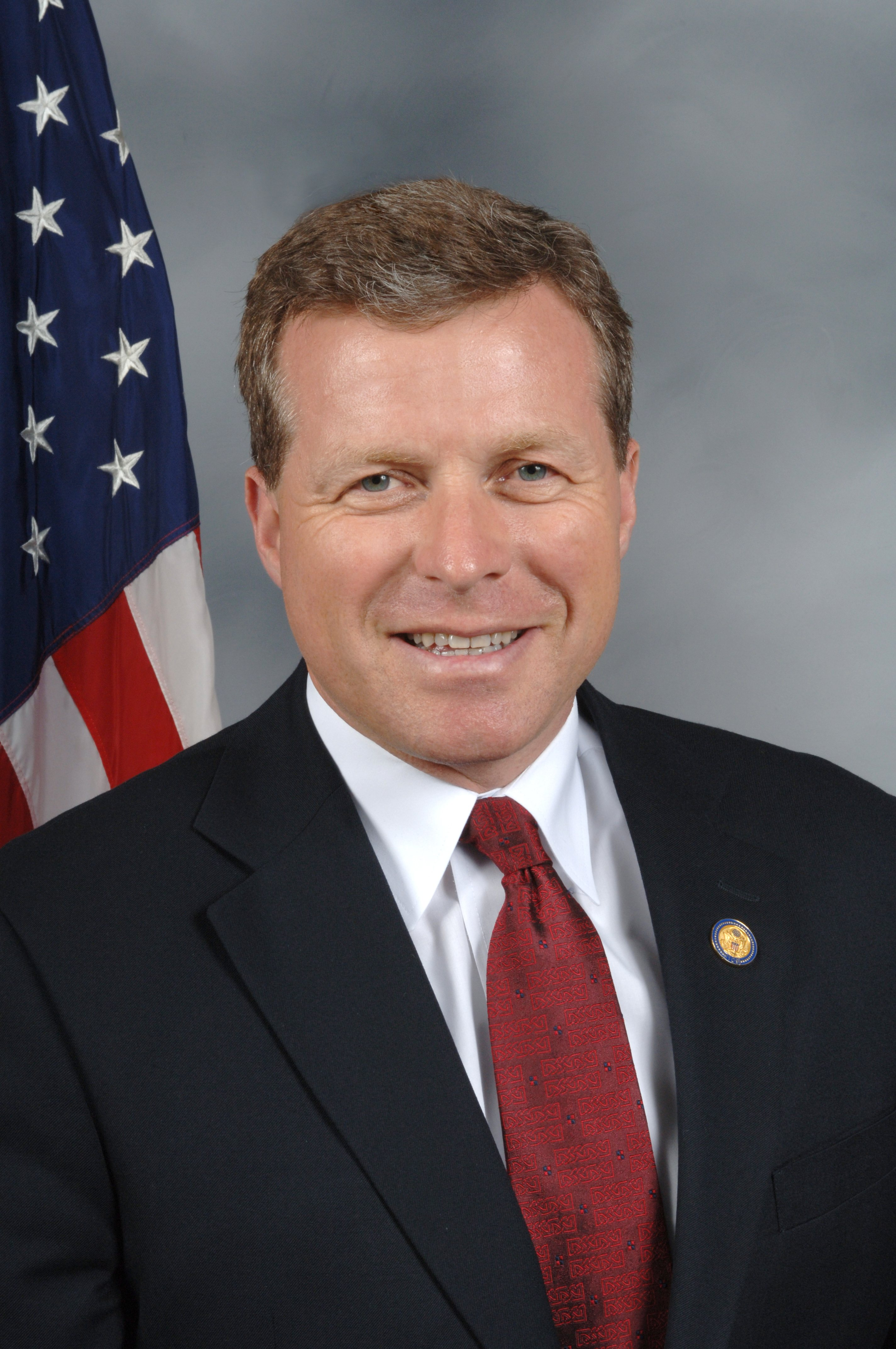 Charlie Dent, U.S. Congressman.